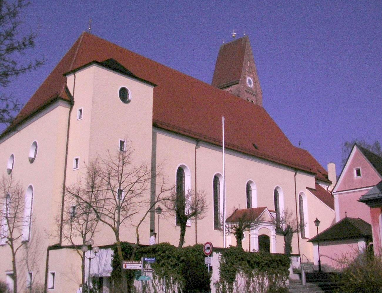 Kirche St. Justina in Bad Wörishofen (März 2011).